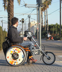 Kompaktes Handbike